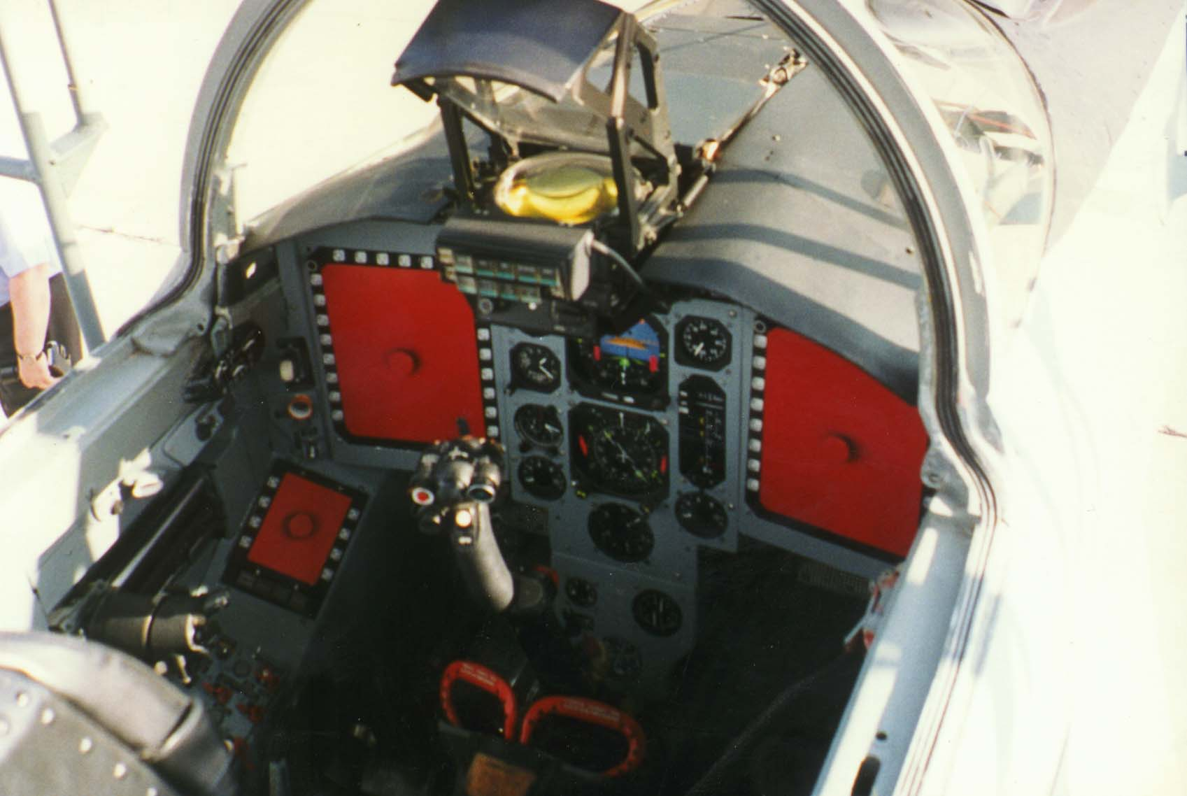 cockpit der MiG-29M